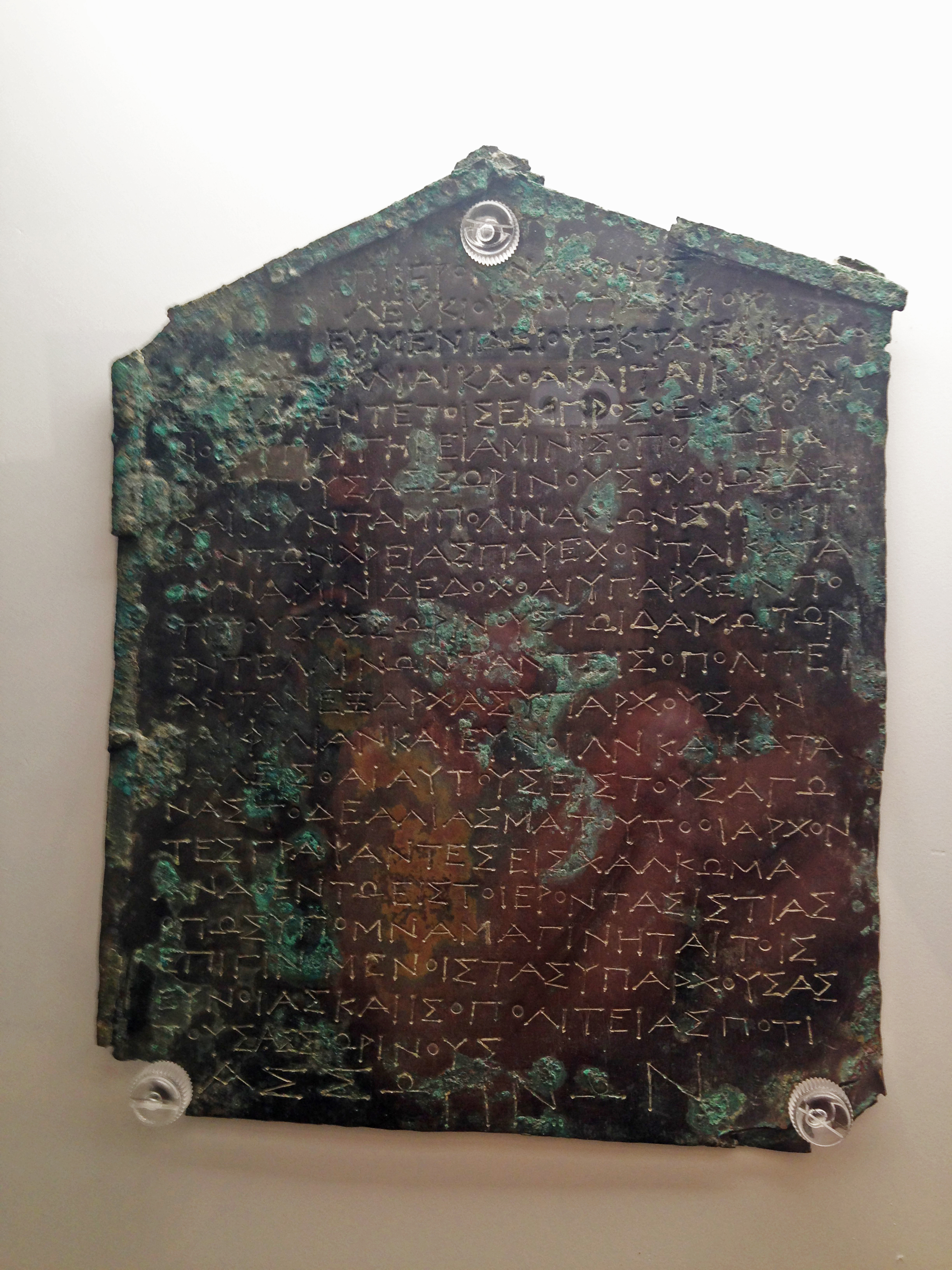 DECRETO DEGLI ENTELLINI IN ONORE DEGLI ASSORINI (Cl AMPOLO VI NENCI) «Sotto lo ieromnamone Leukios figlio dl Pakkios, il ventisei del mese di Eumenideios. [Fu deciso] dall'assemblea conformemente alla decisione del consiglio: dal momento che in precedenza è esistita una isopolitia fra noi e gli Assorini, e similmente anche ora che stiamo ripopolando la città essi per quanto possono ci rendono servigi, si approvi che il popolo degli Entellini abbia con gli Assorini l'isopolitia esistente da principio, l'amicizia e la benevolenza, e che essi siano invitati ai giochi. Questo decreto gli arconti pongano nel santuario di Hestia dopo averlo fatto incidere su tavola di bronzo, affinché diventi ricordo per i posteri della benevolenza e isopolitia esistenti verso gli Assorini».